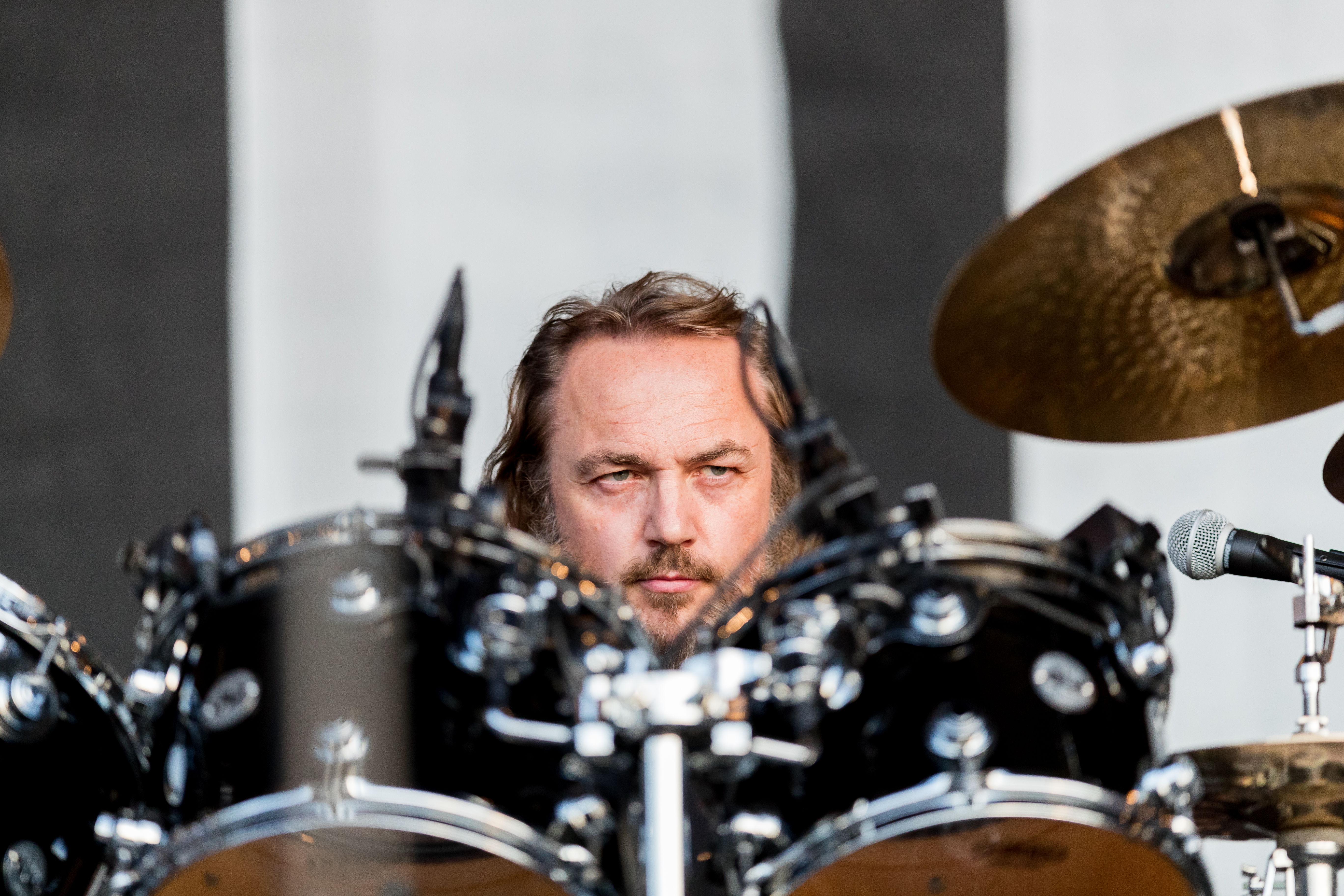 Böhse Onkelz @ Rock the Ring 2018